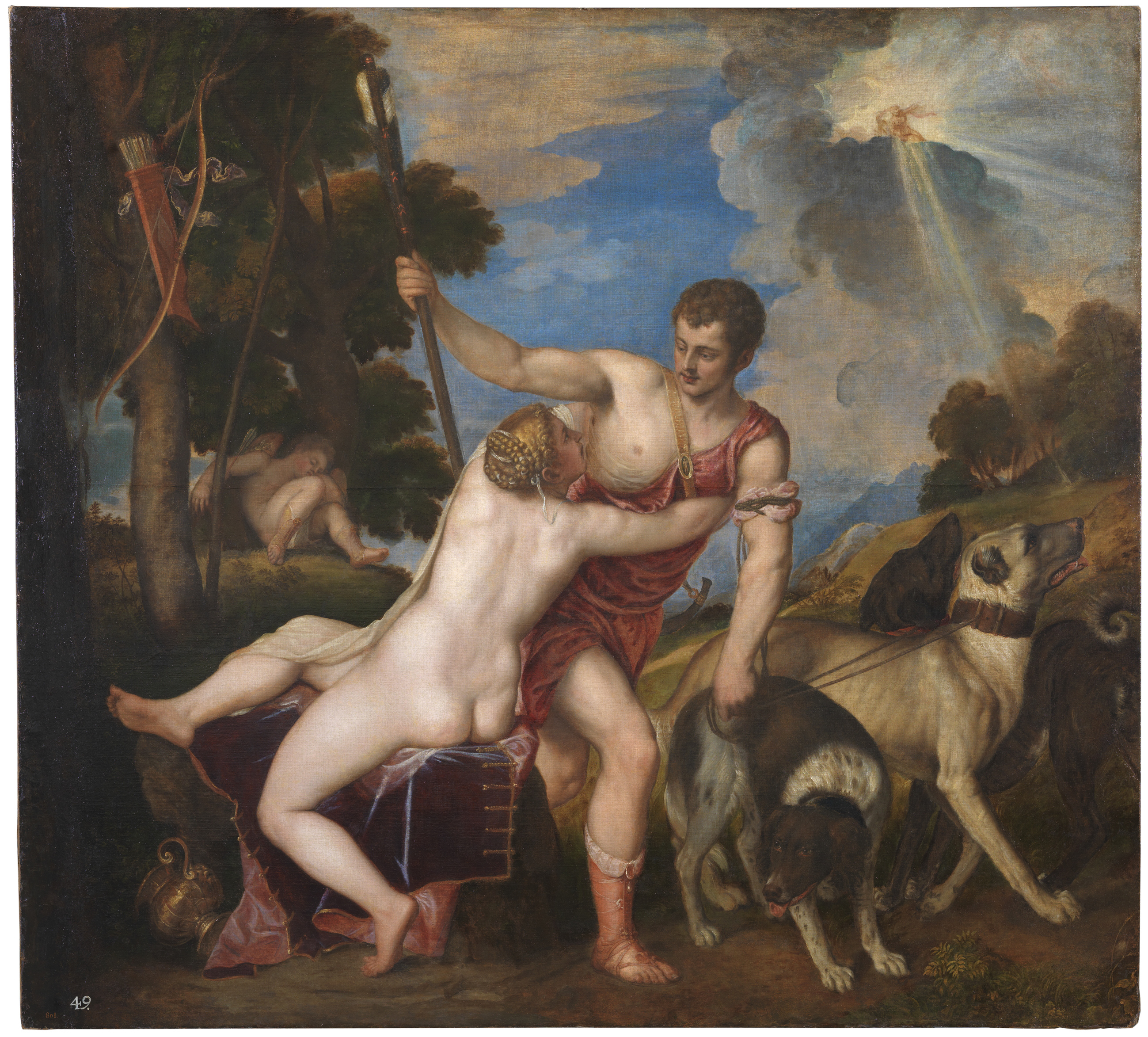 La obra representa a Venus intentando abrazar a Adonis y a este último rechazando los favores de la diosa.